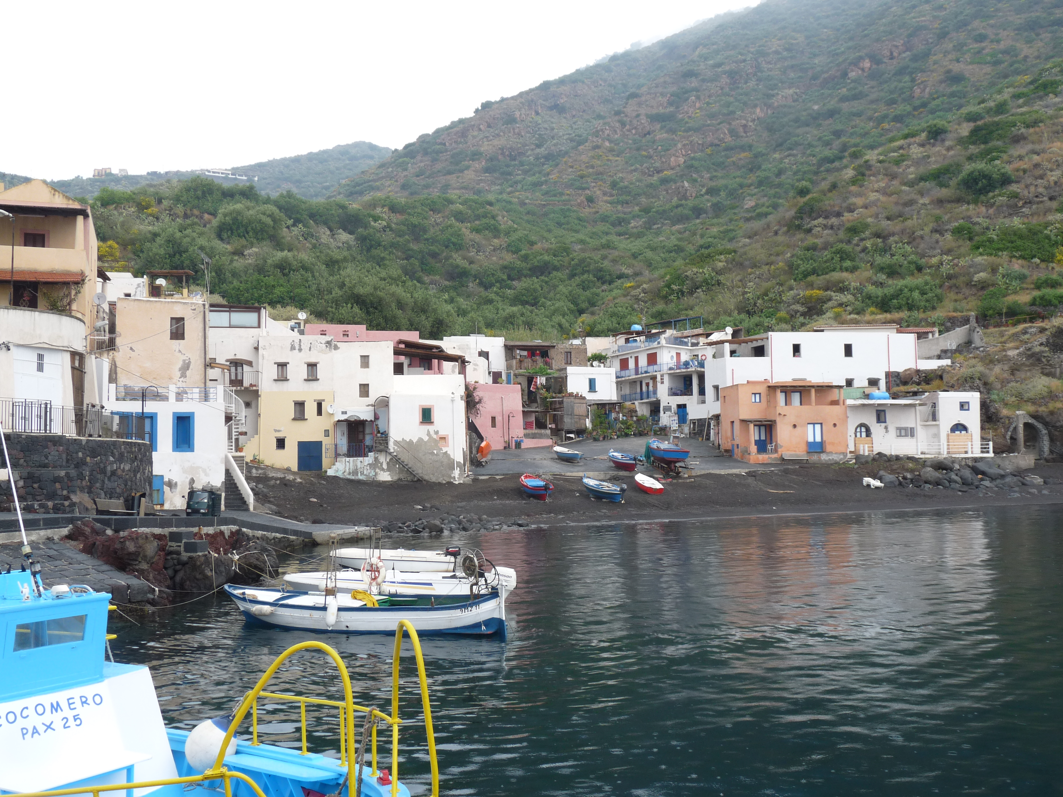 Petit port de Rinella au sud de l'île de Salina (îles Eoliennes, Sicile). Fait partie de la commune de Leni.